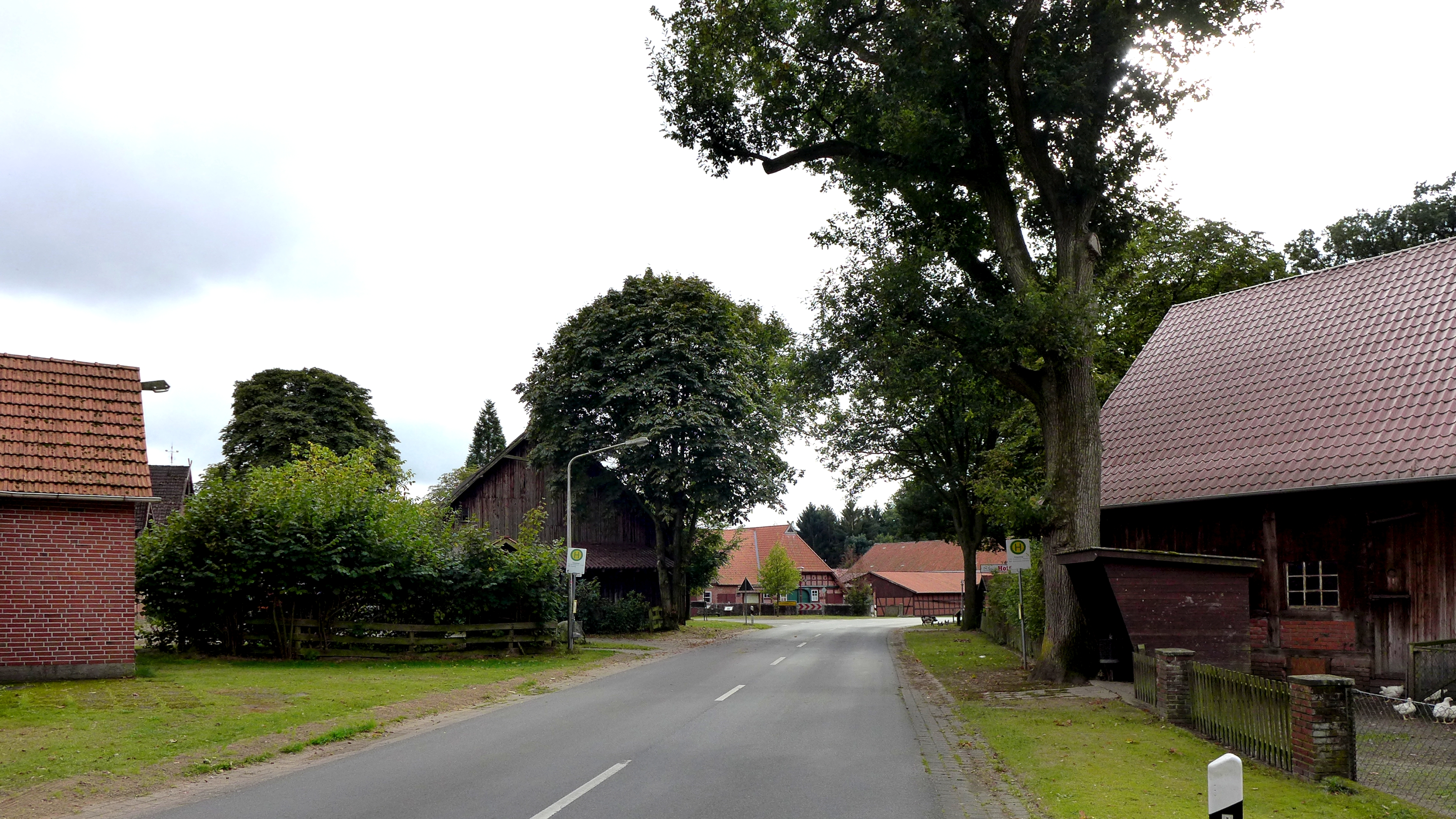 Bushaltestelle Klein Sehlinger Kreuz mit Wartehäuschen, Haltepunkt der Linien 715 und 782. Klein Sehlingen ist ein Ortsteil von Kirchlinteln. Aufnahmedatum 2016-10.